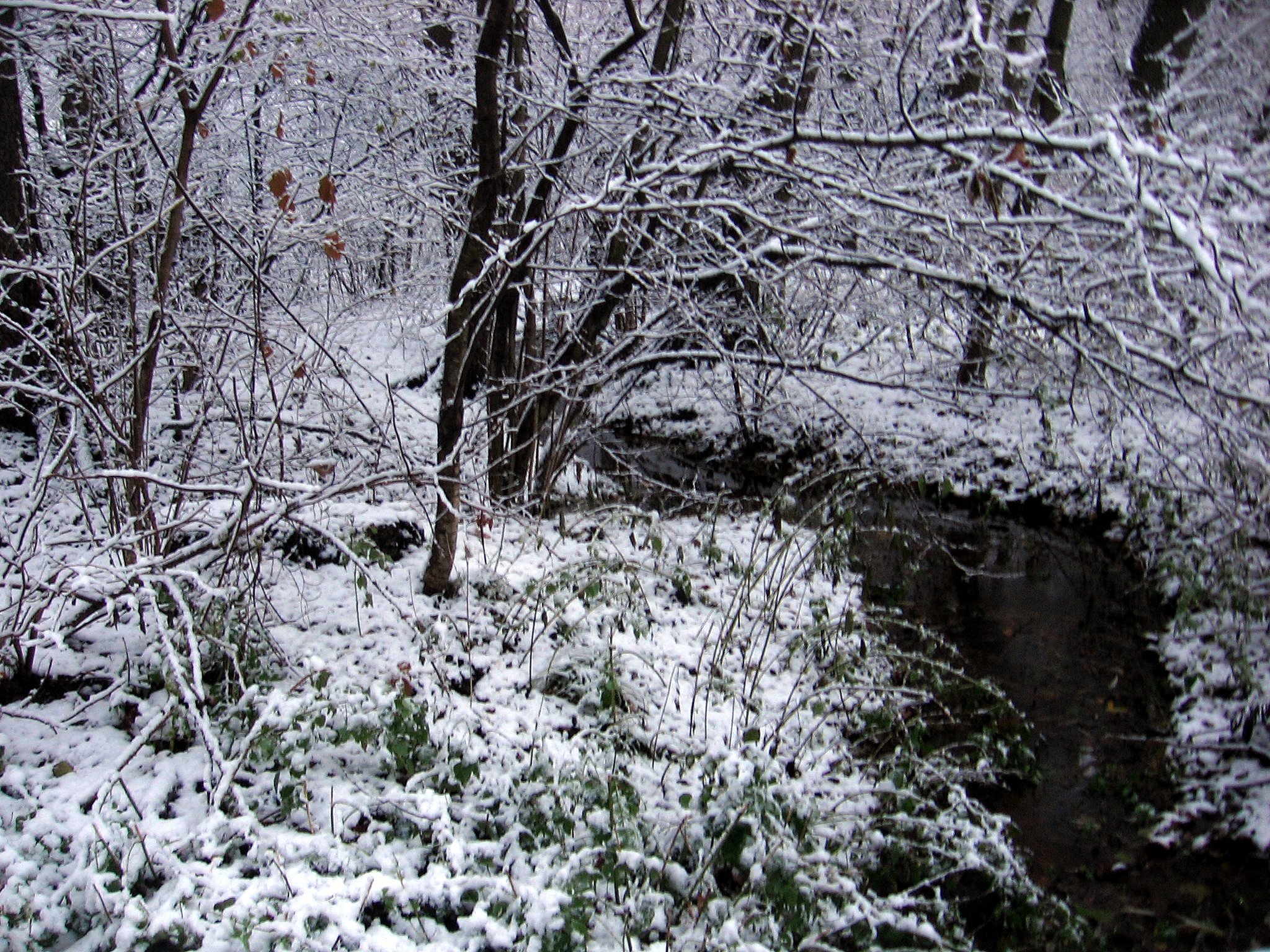 osiedle Mokra we Wrocławiu, Las Mokrzański: potok Łękawica przy ul. Chobieńskiej